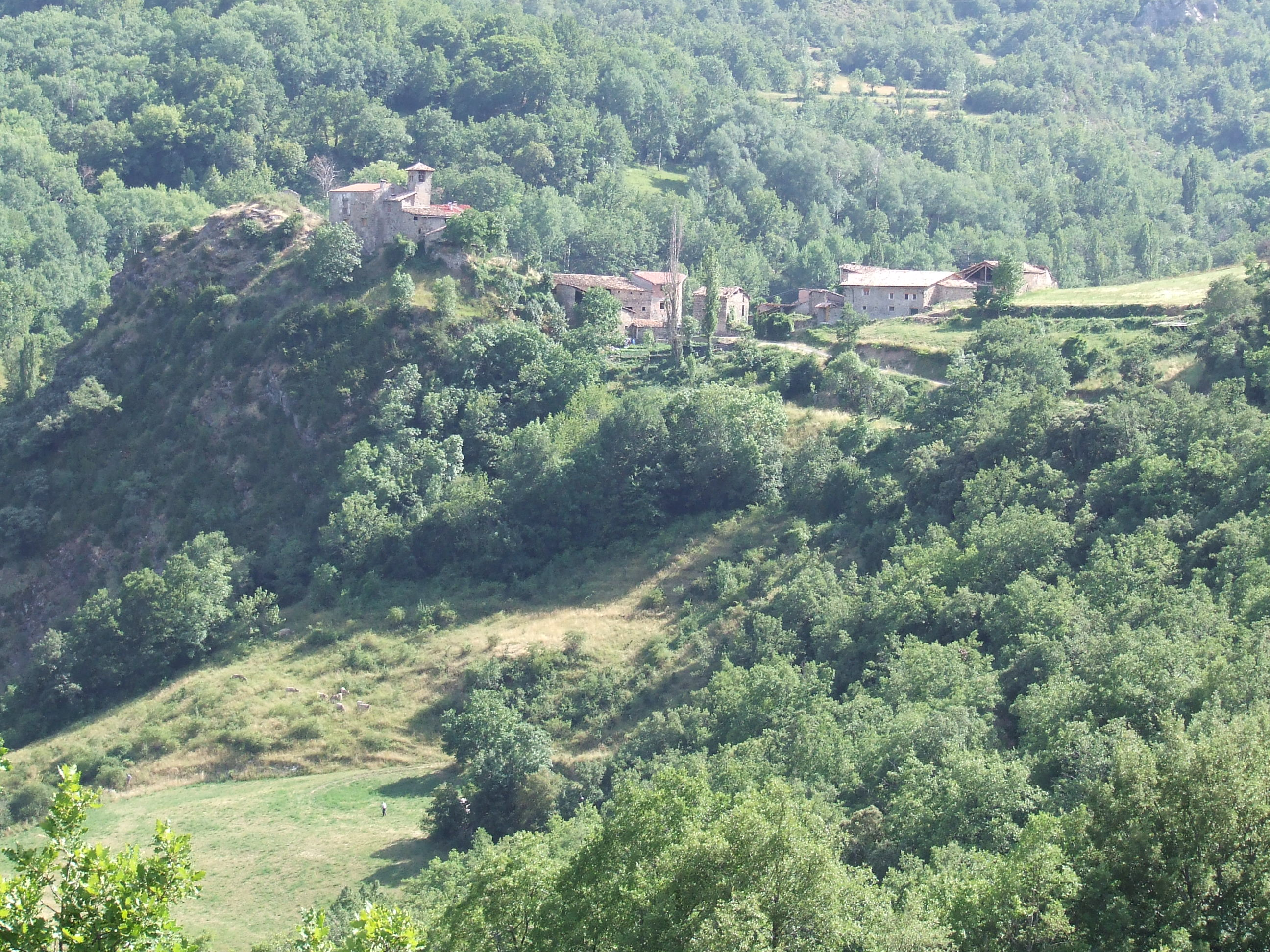 El poble de Naens, des del nord (Senterada, Pallars Jussà)